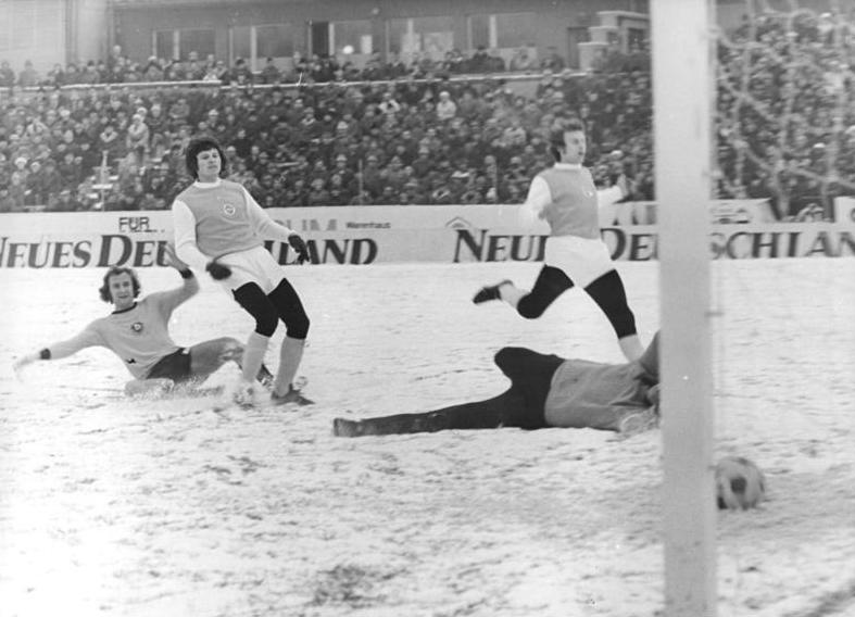 ADN-ZB-Häßler-14.2.76-str-Dresden: Fußball-Oberliga SG Dynamo Dresden-BSG Sachsenring Zwickau 3: 0-Hans-Joachim Kreische (l.) erzielt das 1: 0 für den Spitzenreiter in der Fußball-Oberliga, SG Dynamo Dresden.Weder Joachim Sohykowski noch Torwart Jürgen Croy (beide Zwickau) können diesen Treffer verhindern.